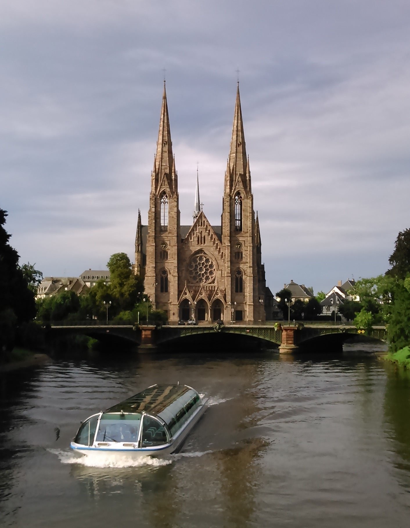 L'église Saint-Paul de Strasbourg, en 2014 après restauration, vue depuis le pont Royal.